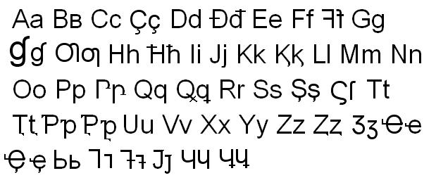 Абхазский алфавит 1928-1938 гг.